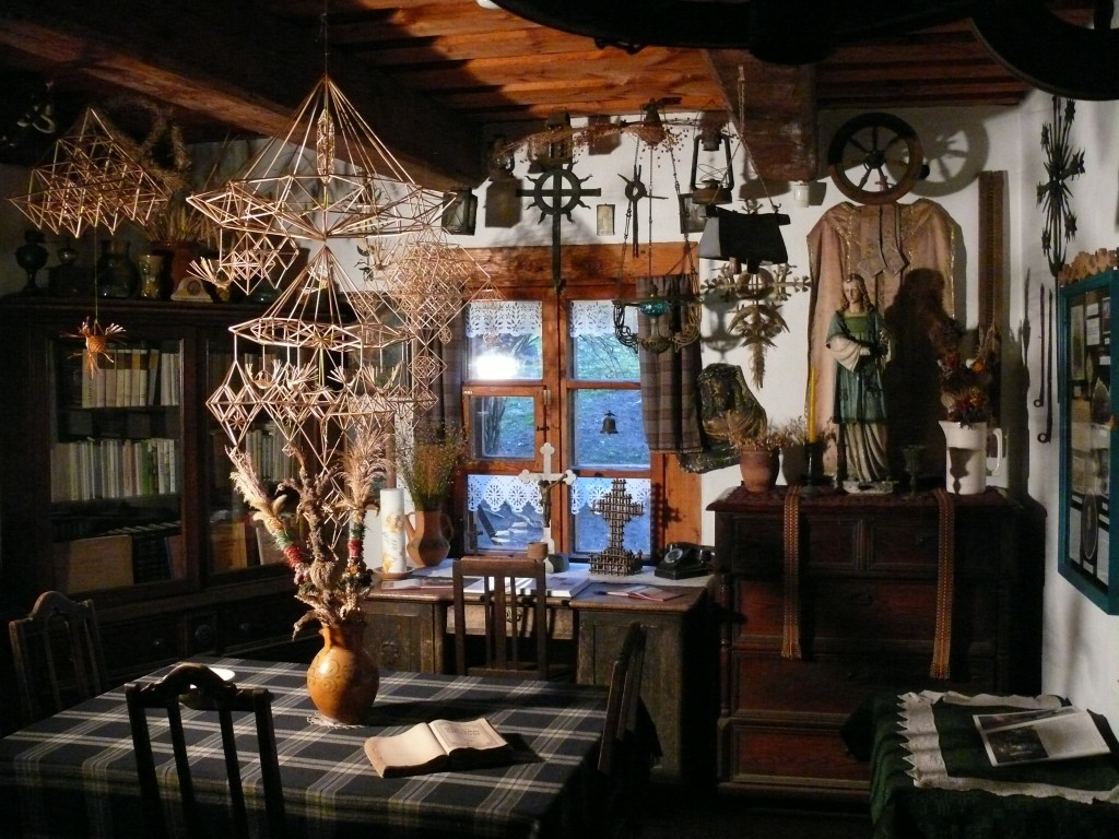 Muziejaus vaizdas iš vidaus